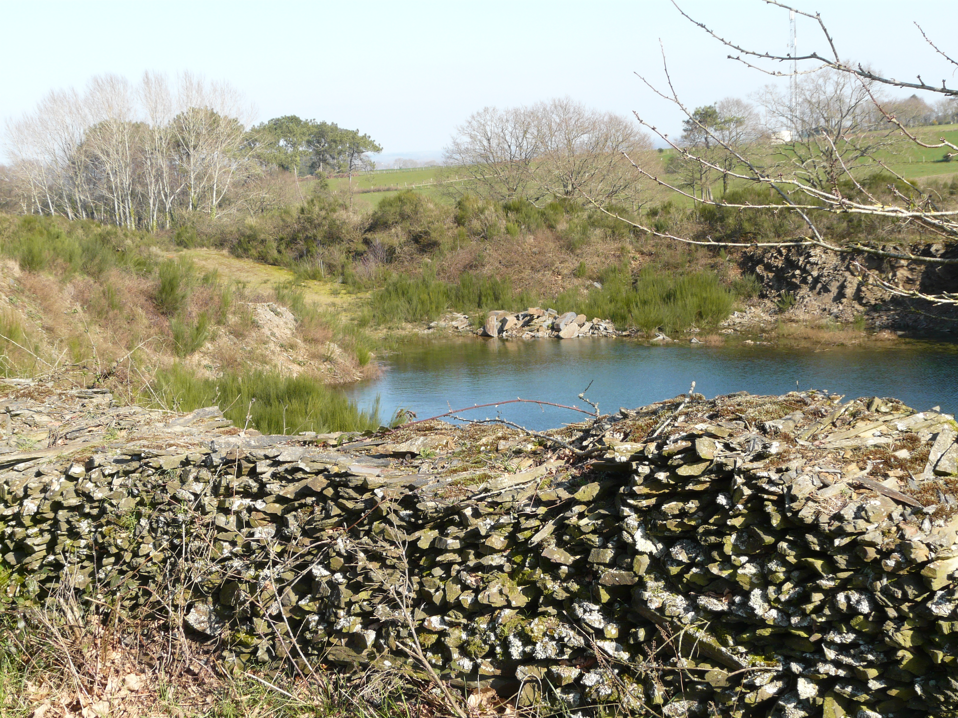 Le schiste en baguettes exploité dans une carrière de Marsac-sur-Don